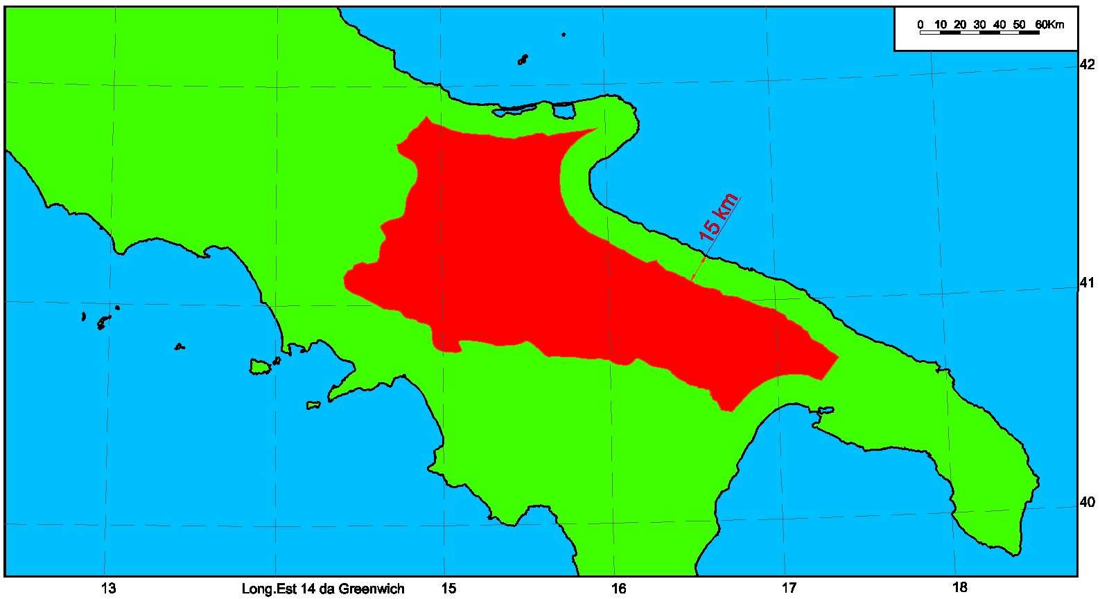 Entroterra dell'Apulia di Plinio